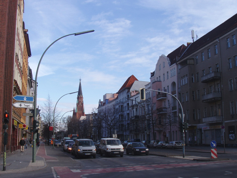 Berlin-Gesundbrunnen, Prinzenallee, Ecke Osloer Straße, im Hintergrund die Stephanuskirche